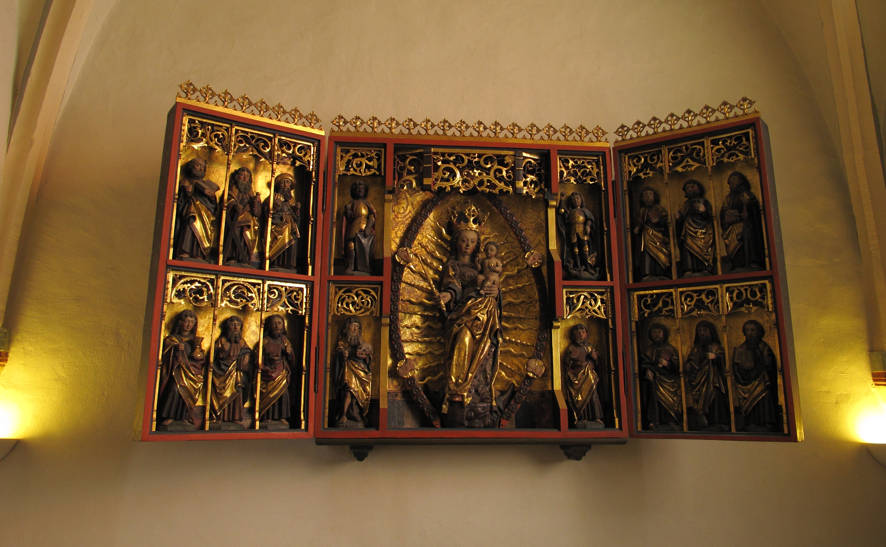 Bad Gandersheim: Stiftskirche, Nebenaltar